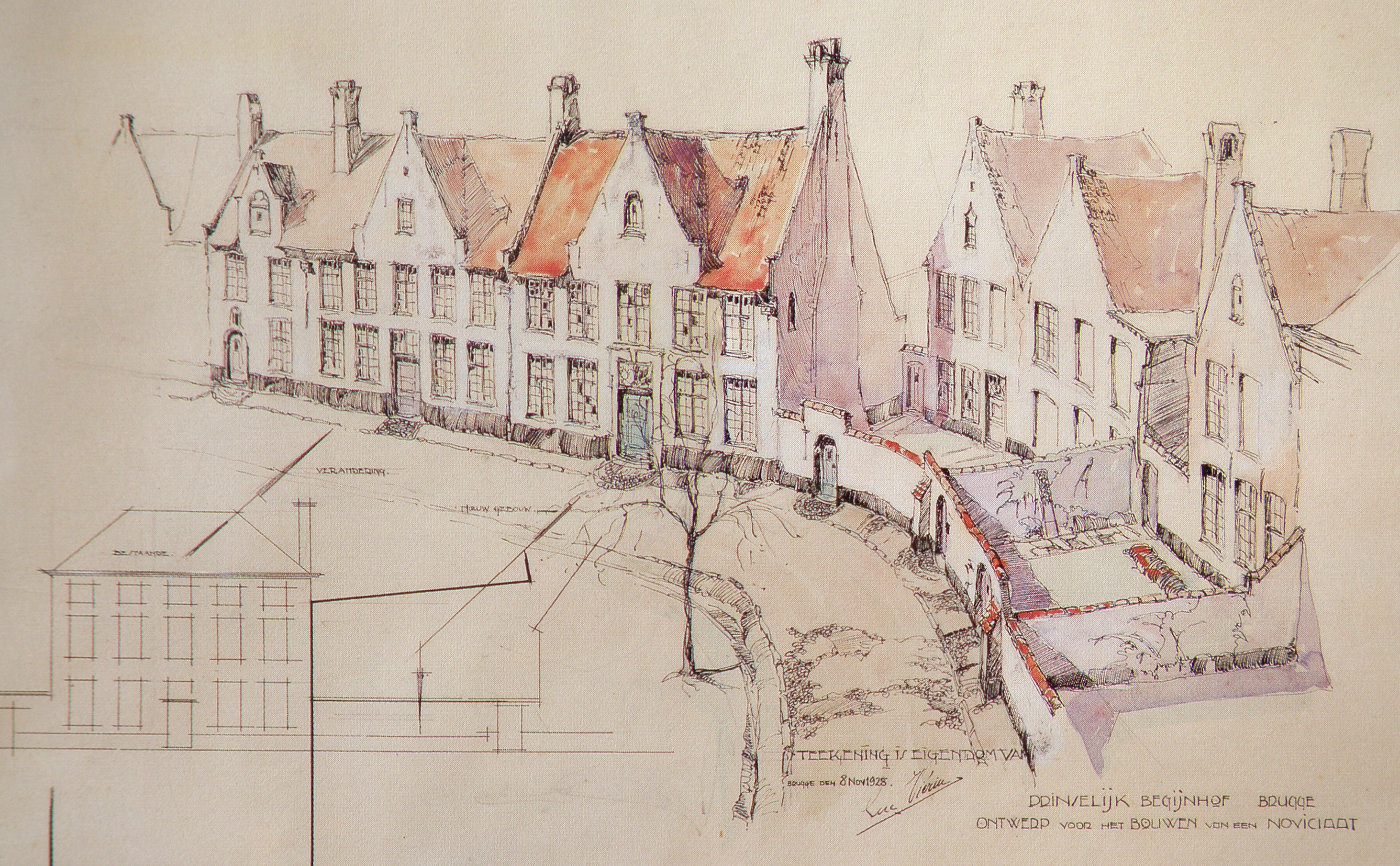 Ontwerptekening van architect Luc Viérin voor een nieuw noviciaat (huis nr. 22) in het begijnhof van Brugge (1928).